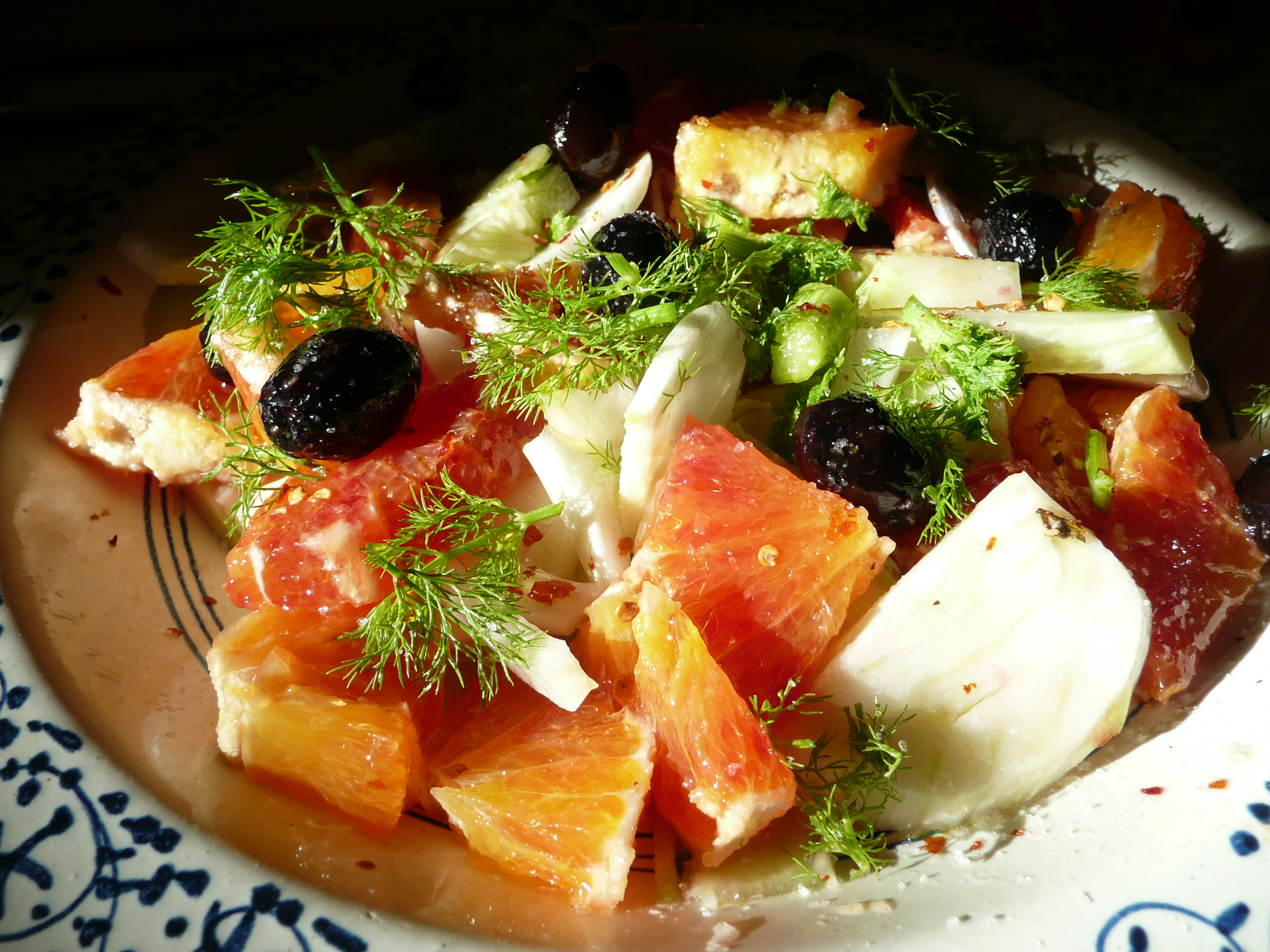 Insalata di arance rosse, finocchio e olive nere